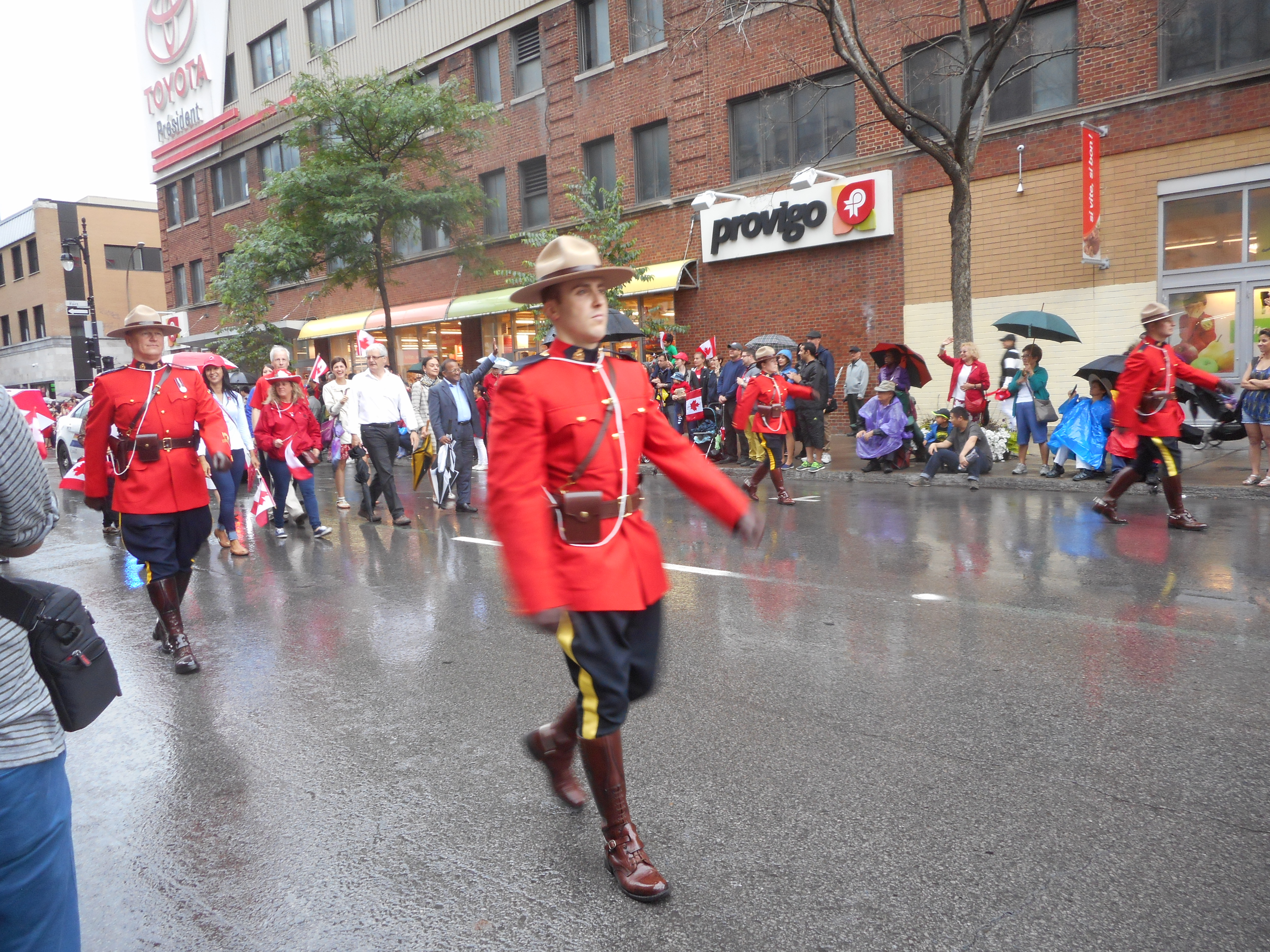 Défilé de la Fête du Canada, rue Sainte-Catherine Ouest, Montréal